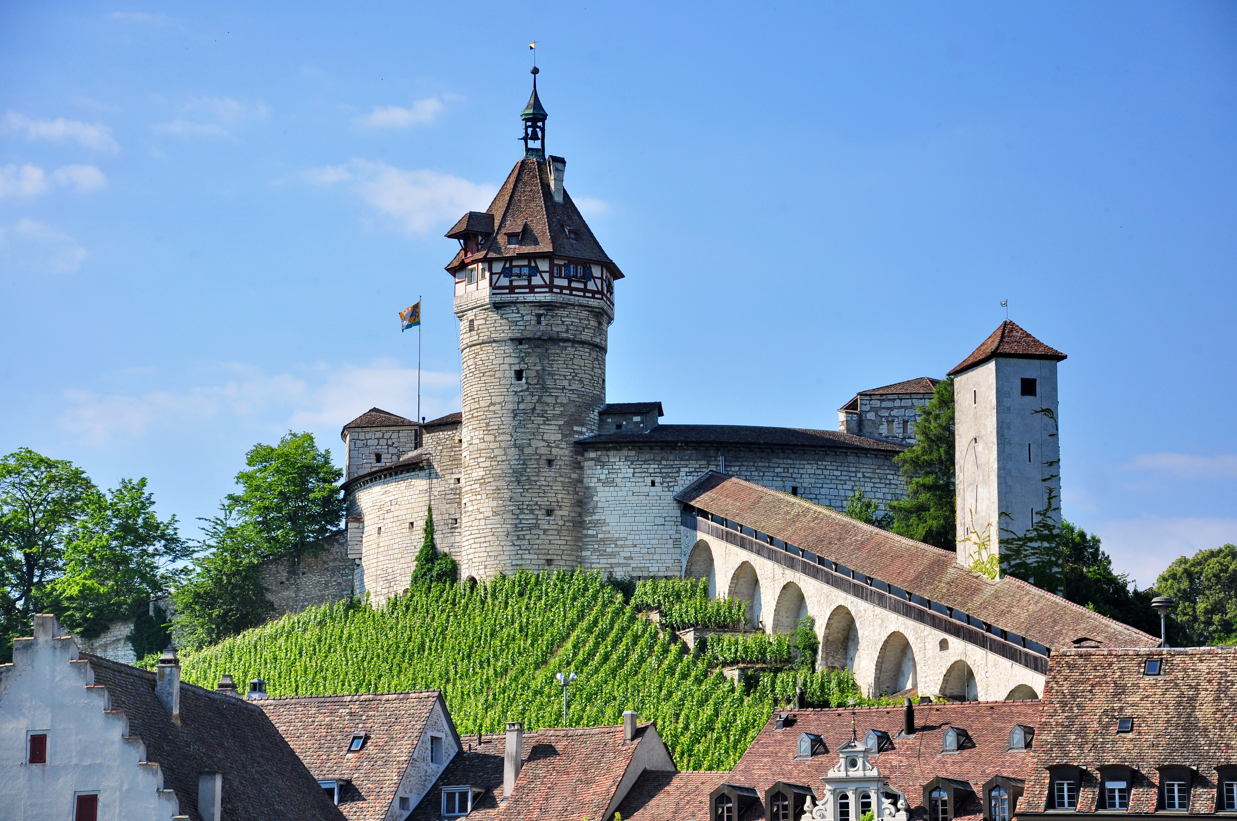 Munot in Schaffhausen (Switzerland) as seen from Feuerthalen